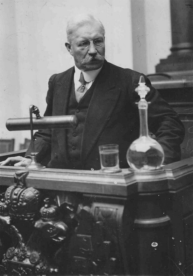 Павел Николаевич Милюков во время выступления в Государственной Думе 4-го созыва